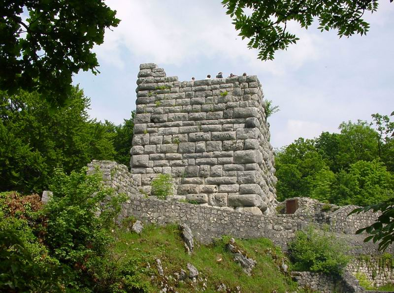 Hohengundelfingen public domain, eigenes Foto von 2003 Bergfried Mewes 20:28, 6. Feb 2005 (CET)